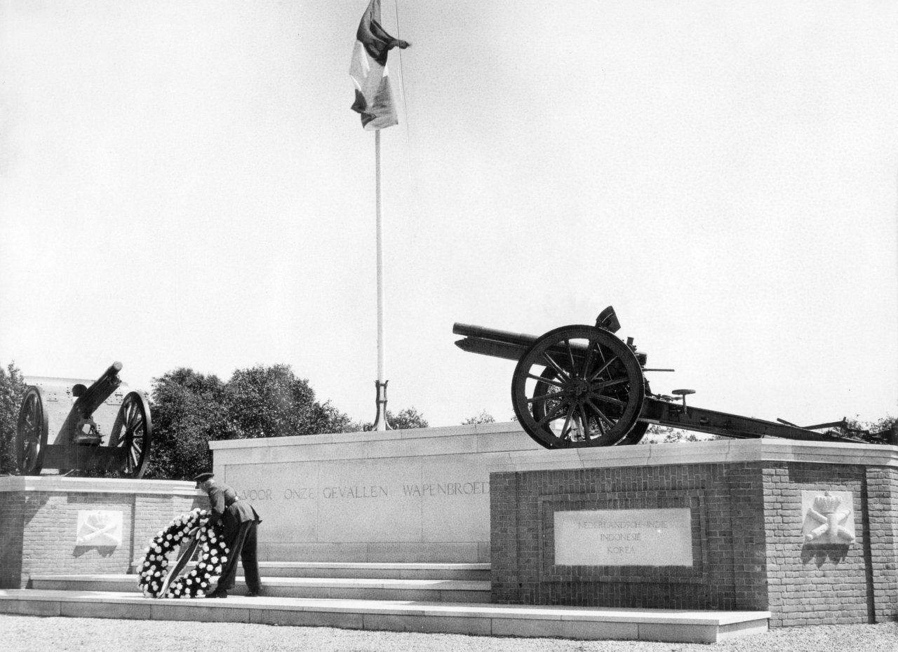 Het 'Artillerie-monument' in 't Harde (gemeente Elburg) is opgericht ter nagedachtenis aan alle wapenbroeders die zijn gesneuveld, onder meer tijdens de Tweede Wereldoorlog, in het voormalig Nederlands-Indië en in Korea. Zoveel mogelijk namen van omgekomen artilleristen zijn opgenomen in een Ereboek dat onderdeel uitmaakt van een permanente expositie in het Nederlands Artillerie Museum. Iedere dag wordt een bladzijde van dit boek omgeslagen. Regelmatig wordt het boek aangevuld met namen. Initiator en samensteller is maj. art. bd. G. Verburg. Collectie: Fotocollectie Elsevier Bestanddeelnummer 047-0577